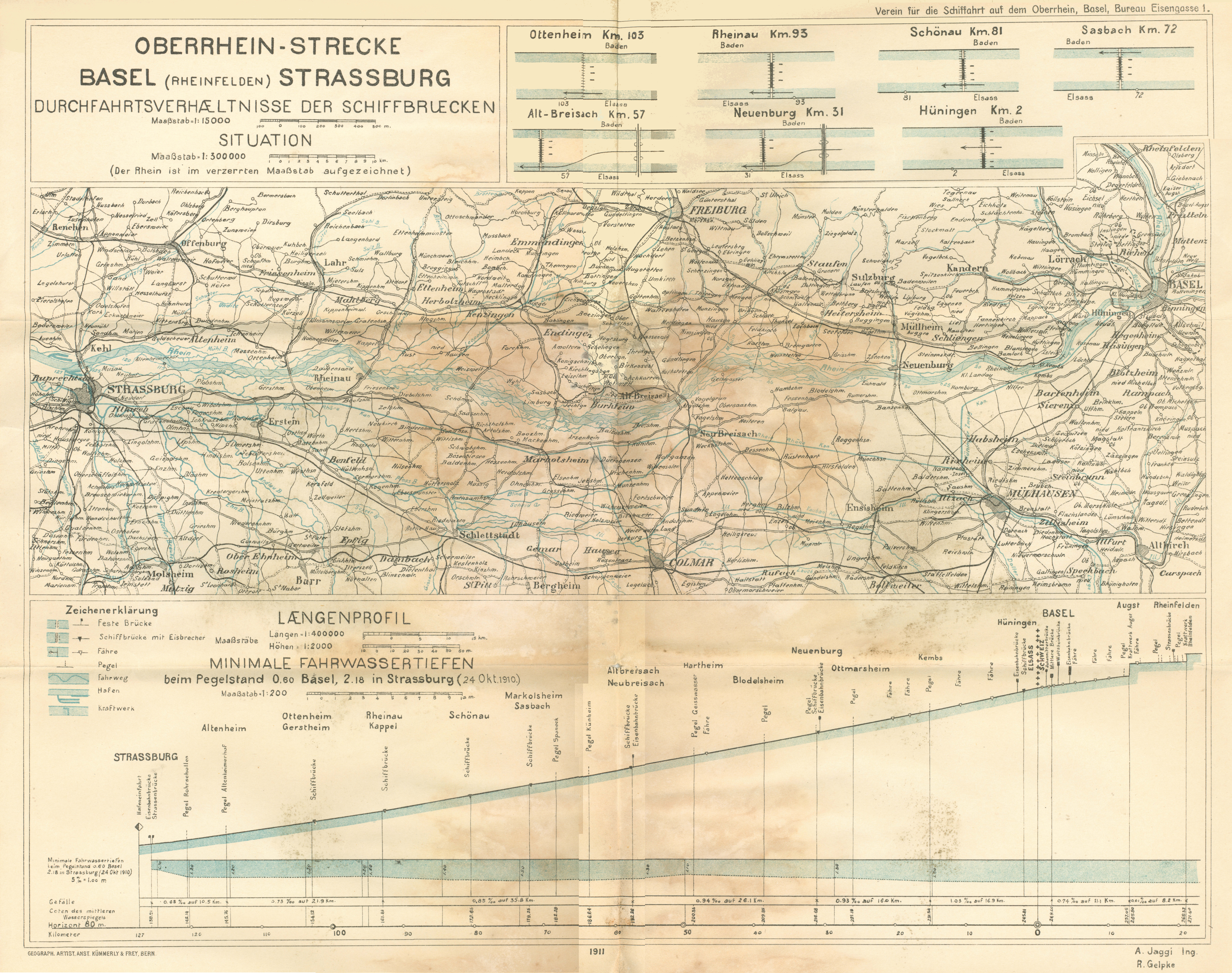 Oberrhein-Strecke BASEL (Rheinfelden) Straßburg, Durchfahrtsverhältnisse der Schiffbrücken Der «Verein für die Schiffahrt auf dem Oberrhein, Basel, Bureau Eisengasse 1» publizierte diese Karte 1911. Neben «festen Brücken» und Fähren sind auf der Karte auch «Schiffbrücken mit Eisbrecher» eingezeichnet.